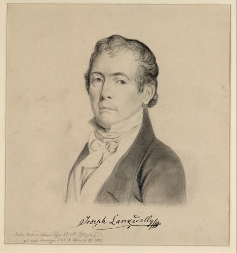 Josef Lanzedelli d. Ä. (1772-1831), österreichischer Maler und Lithograph, Selbstporträt, um 1810